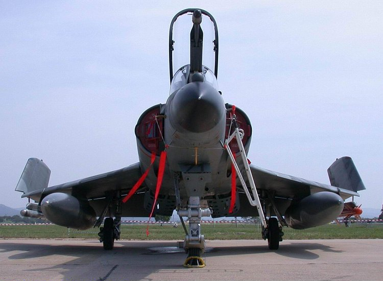 Le Super Etendard n°71 (dernier Super Etendard livré à la marine nationale) de la flottille 17F avec 2 réservoirs supplémentaires, 2 missiles MAGIC 2 d'entrainement et la crosse sortie (4 juin 2005). Original caption: “ Photo © Franck Dubey”